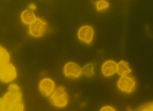 Erythrozyten im Urin. Gewellte unregelmäßige Doppelkontur der Membran. Fluoreszenzmikroskopie, Acridinorange-Färbung.